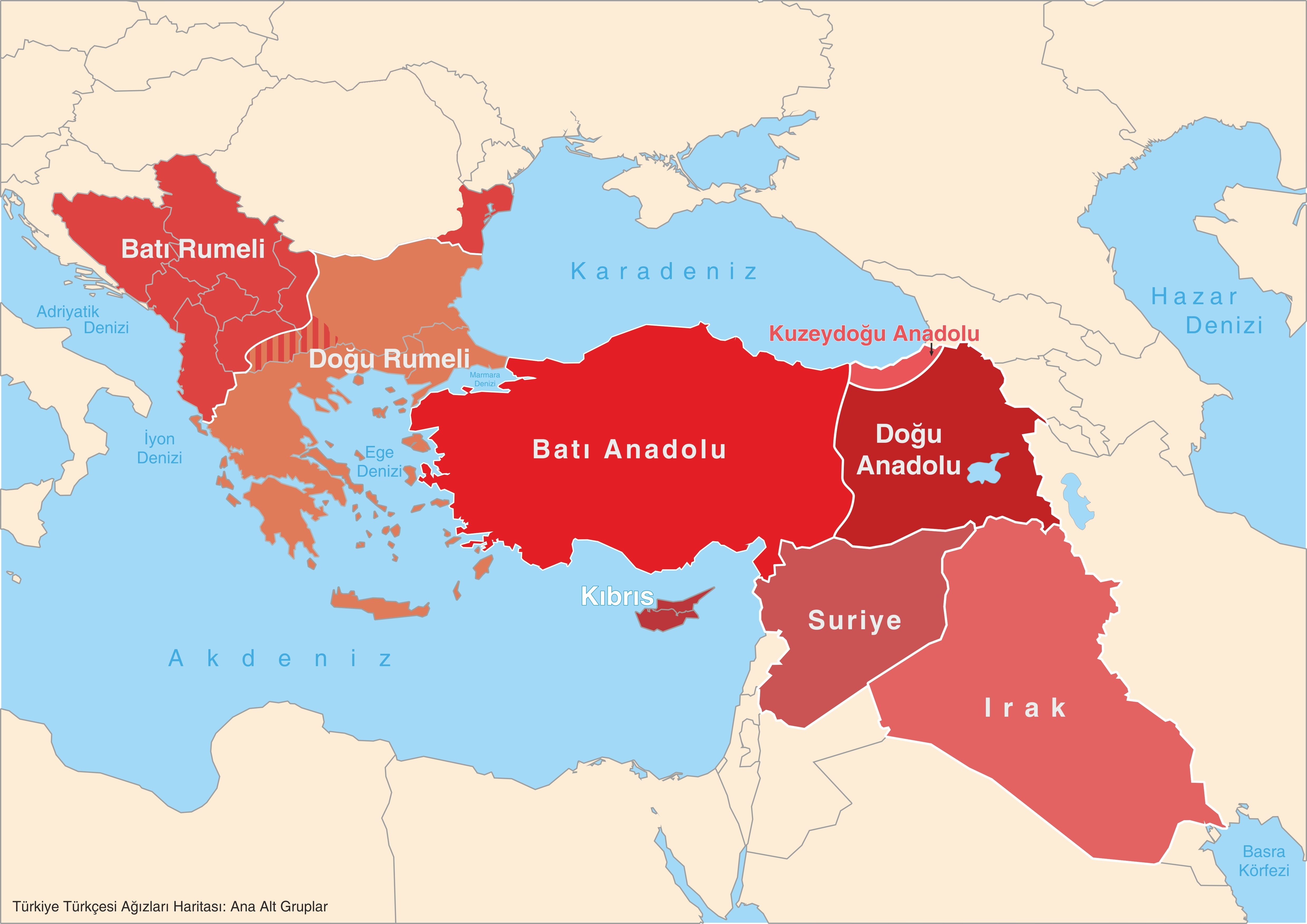 Türkiye Türkçesi ağız haritası: Ana alt gruplar Harita kaynakları: Ana kaynaklar: Karahan, Leyla 1996, Anadolu Ağızlarının Sınıflandırılması, Türk Dil Kurumu, Ankara Németh, Gyula 1983, “Bulgaristan Türk Ağızlarının Sınıflandırılması Üzerine”, TDAY Belleten 1981-1982, Türk Dil Kurumu, Ankara, 113-167 Diğer kaynaklar: Bayatlı, Hidayet Kemal 1996, Irak Türkmen Türkçesi, Türk Dil Kurumu, Ankara Demir, Nurettin 2003, “Kıbrıs Ağızları Üzerine Çeşitlemeler”, Türk Dili, Sayı 614 / Şubat 2003, 203-208 İğci, Alpay 2013, “Konuşulan Dil Türkiye Türkçesinin Sahası”, Ufuk Dergisi, S: 21, Ocak-Mart 2013, 6-8 Saracoğlu, Erdoğan 2012, Kıbrıs Ağzı, Akçağ, Ankara